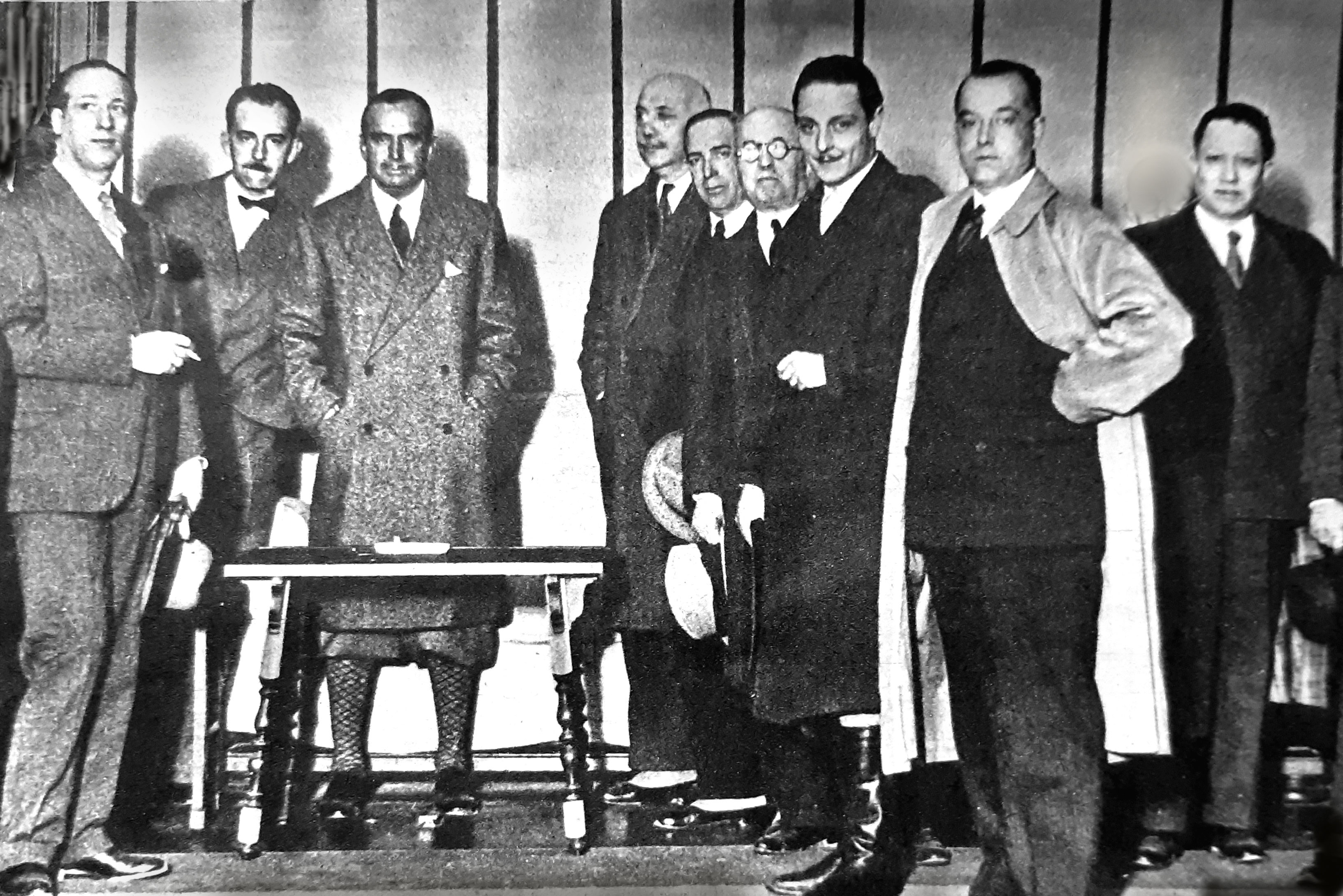 Blasetti nel 1931 alla "Cines" con alcuni dirigenti dell'azienda, durante una visita negli stabilimento romani di via Vejo di Douglas Fairbanks